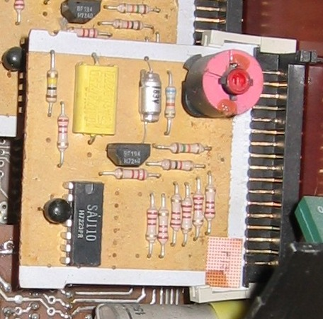 Einer der 12 Tongeneratoren der Philicorda GM760 mit T-Flipflop Array (Digitalzähler) „SAJ110“ für die tieferen Oktaven des Tons